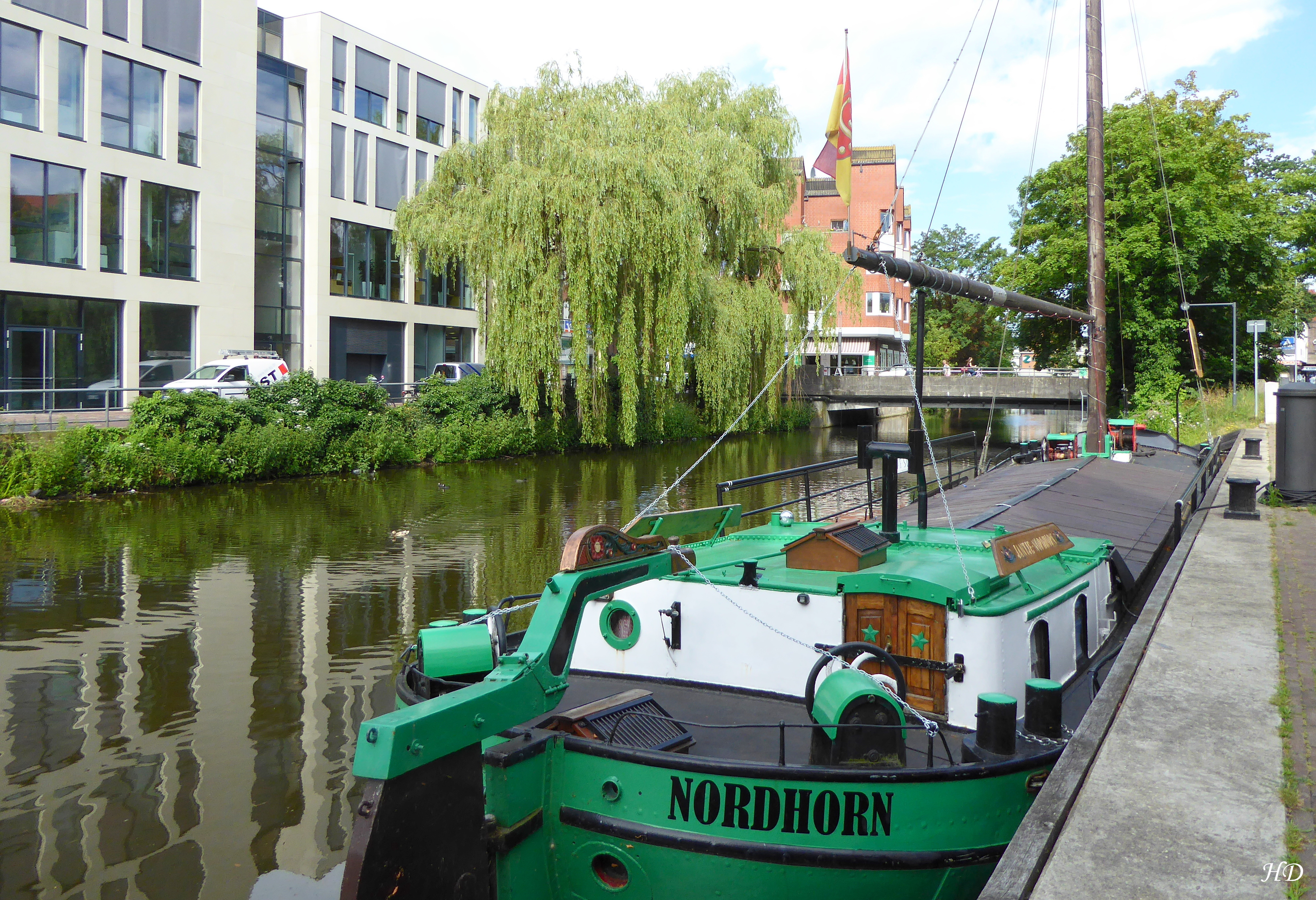 Alter Hafen